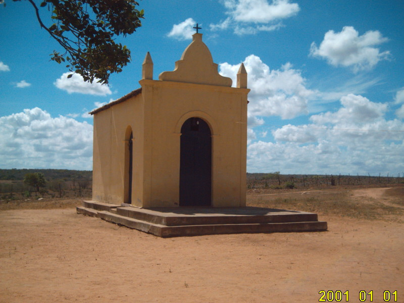 Capela de Nossa Senhora da Conceição em Pitombeira, São Paulo do Potengi